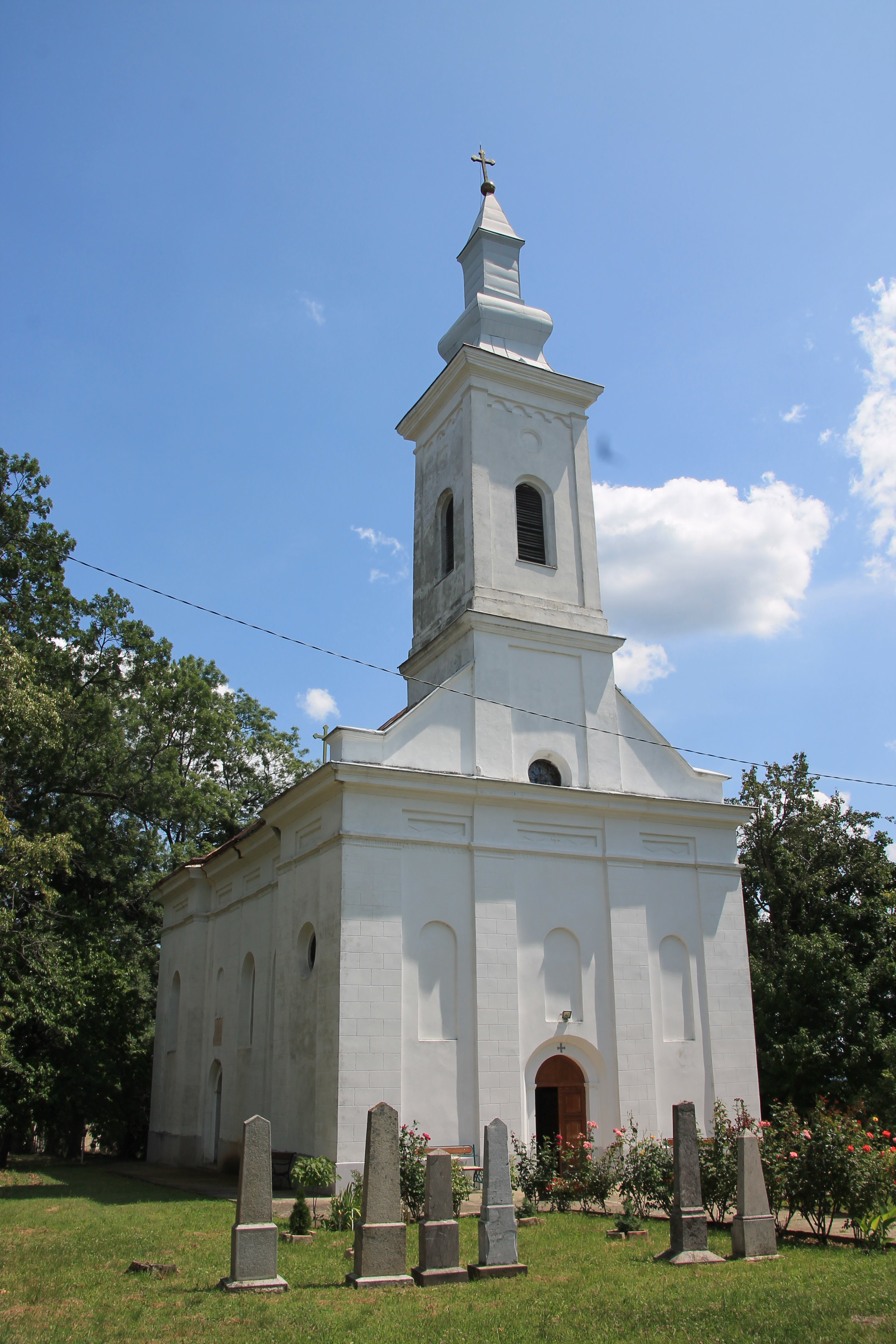 Crkva Silaska Sv. Duha (Koraćica)